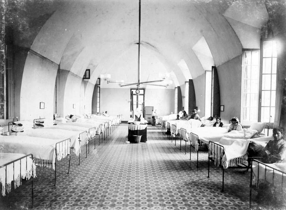 Sala de Mujeres en el antiguo Hospital Pirovano de Buenos Aires.